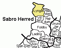 Kort der viser Lyngå Sogn, Sabro Herred, Århus Amt, Denmark.